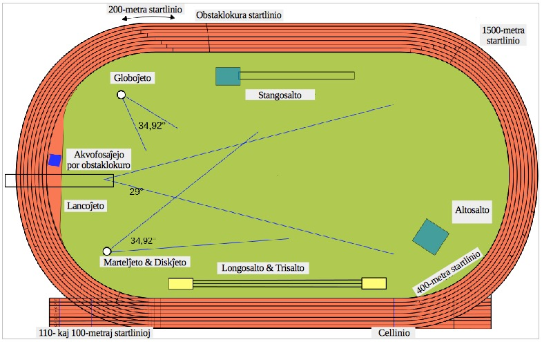 Atletika stadiono